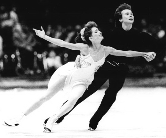 Factual corrections and alternative descriptions are encouraged separately from the original description. Additionally errors can be reported at this page to inform the Bundesarchiv. Original historic description: Marina Klimowa, Sergej Ponomarenko ADN-ZB Settnik 7.4.89 Berlin: ISU-Weltschaulaufen in der Werner-Seelenbinder-Halle (am 6.4.89)- Großen Beifall der 4000 Zuschauer erhielten die Weltmeister im Eistanz, Marina Klimowa-Sergej Ponomarenko (UdSSR), die den Abschluß der großen Gala bildeten.